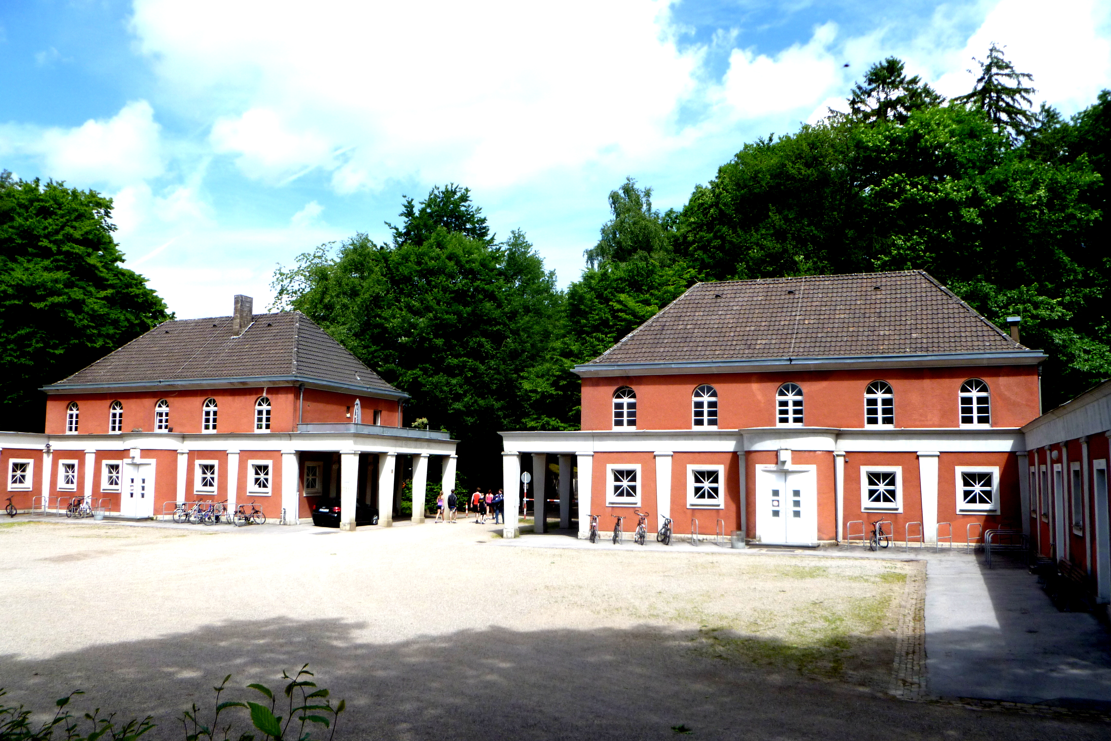 Waldstadion Aachen - Gebäudetrakt, Baudenkmal in Aachen-Mitte